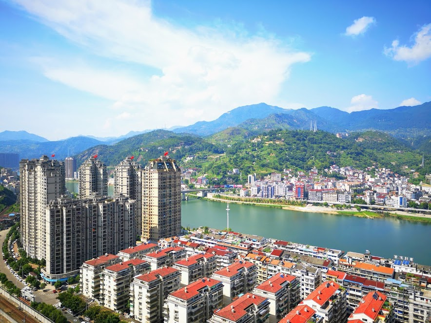 Photo de Qingtian prise du haut d'un gratte-ciel